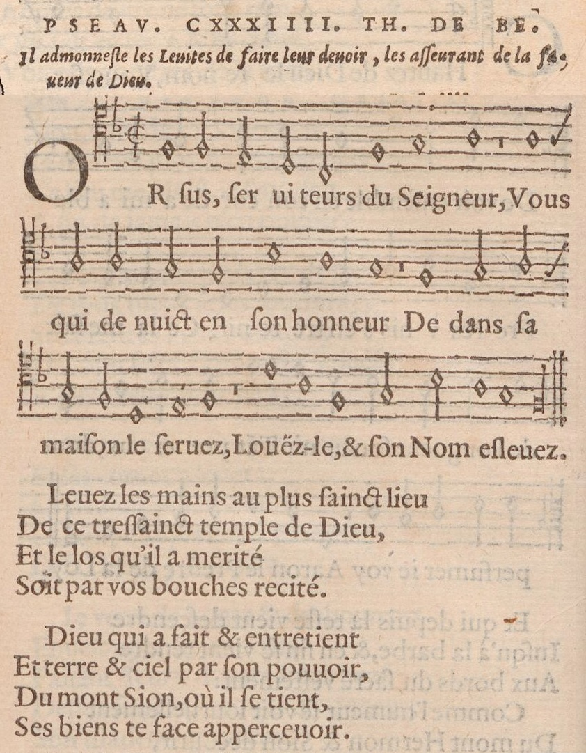 Le Psaume 134 dans le Psautier de Genève, 1565